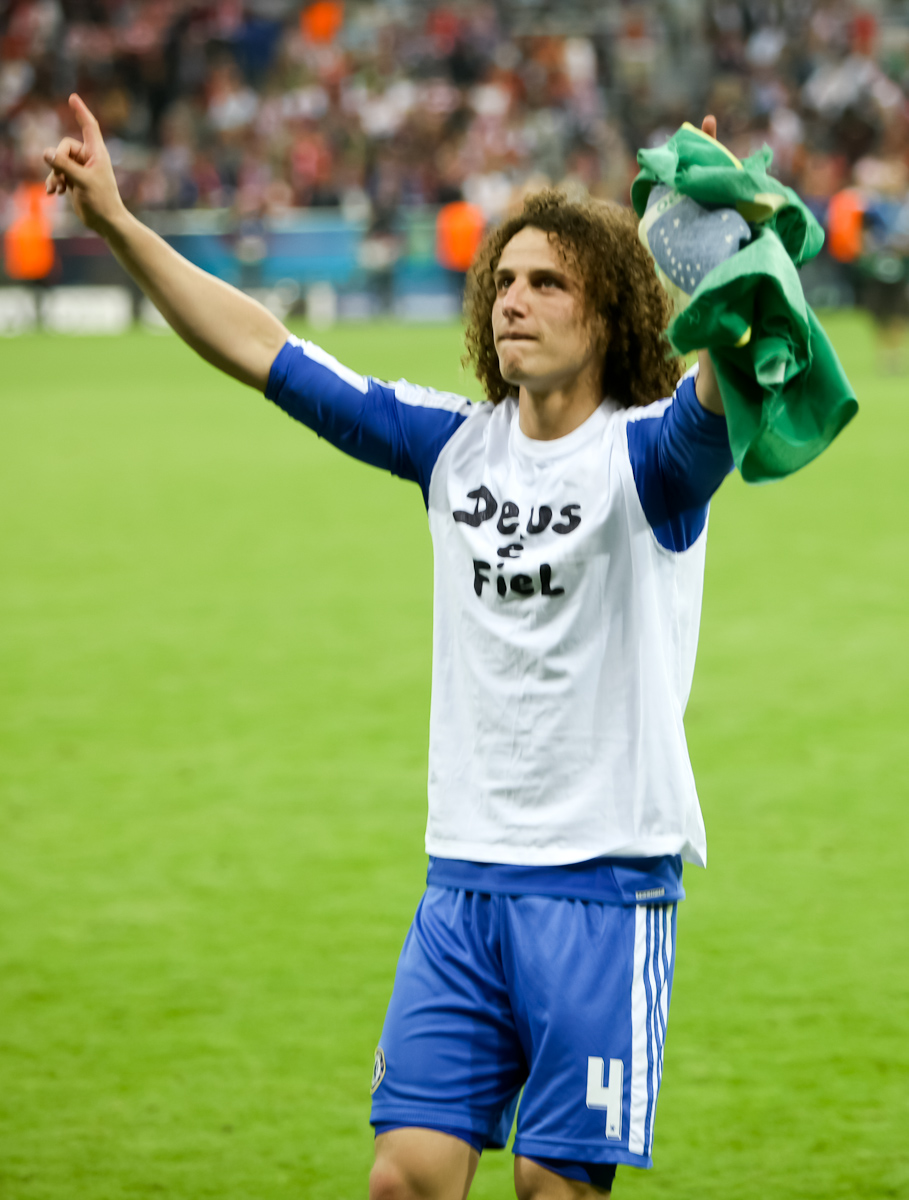 RA1_6511